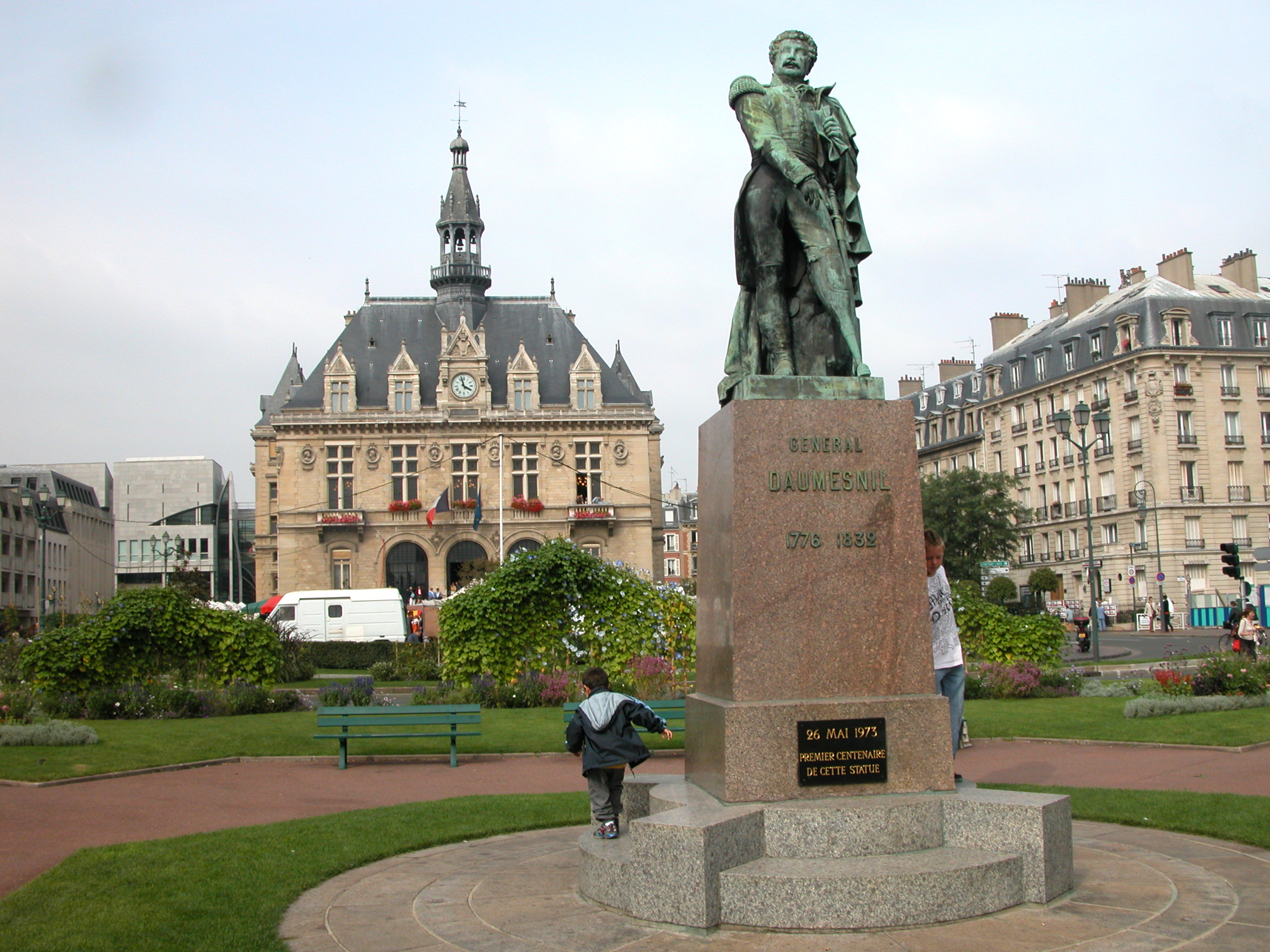 L'Hotel de Ville de Vincennes et la statue de Daumesnil - Photo personnelle (2006)